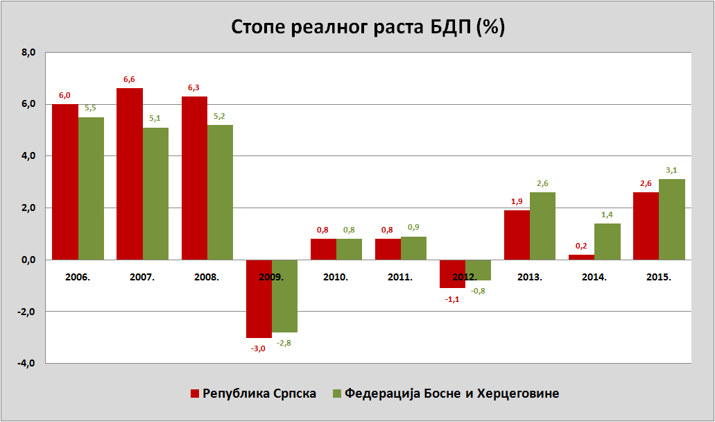 Српски (ћирилица): БДП у Републици Српској и Федерацији БиХ, стопе реалног раста (2006-2014).